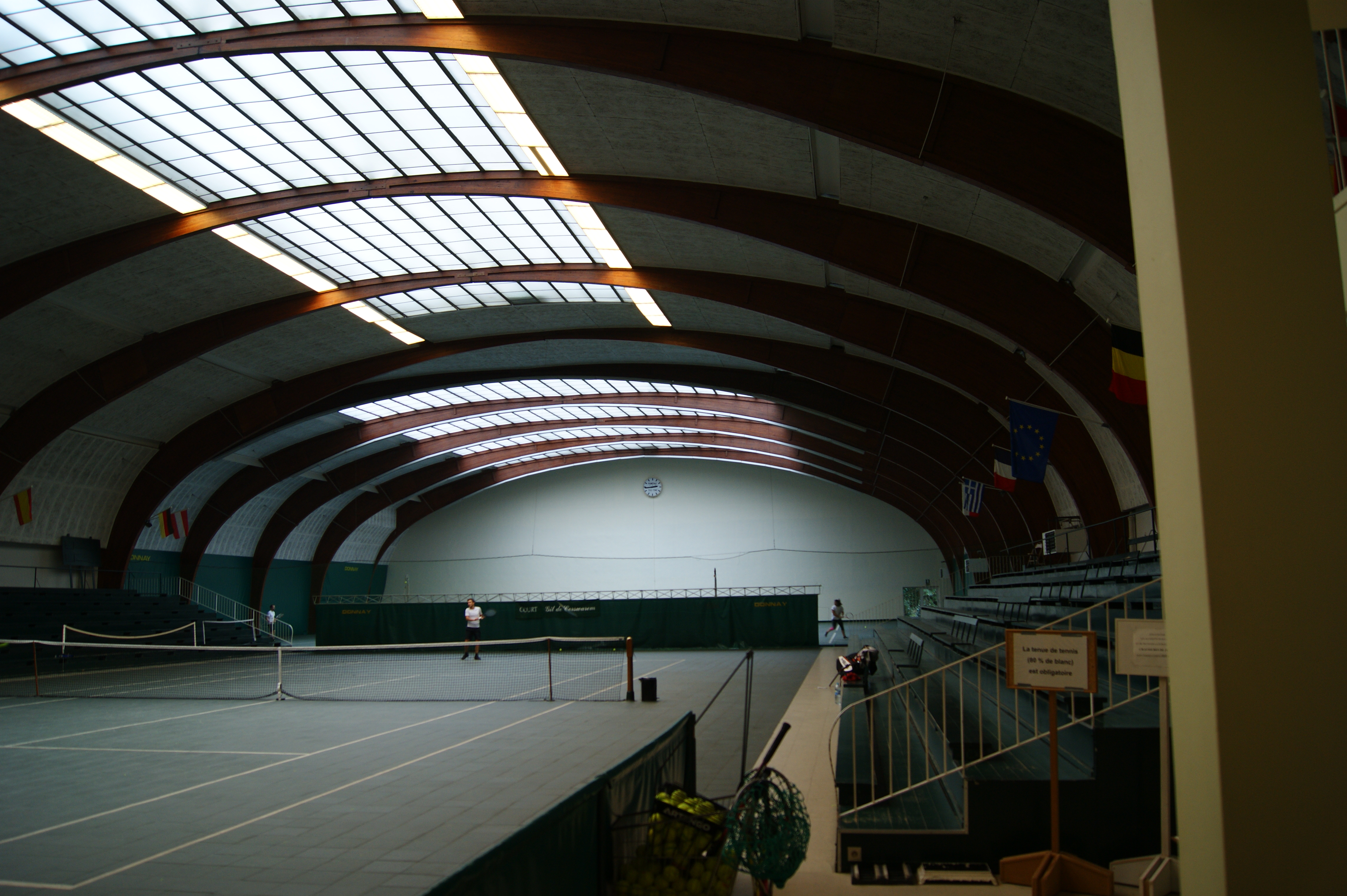 26 Rue du Beau Site, 1150 Bruxelles